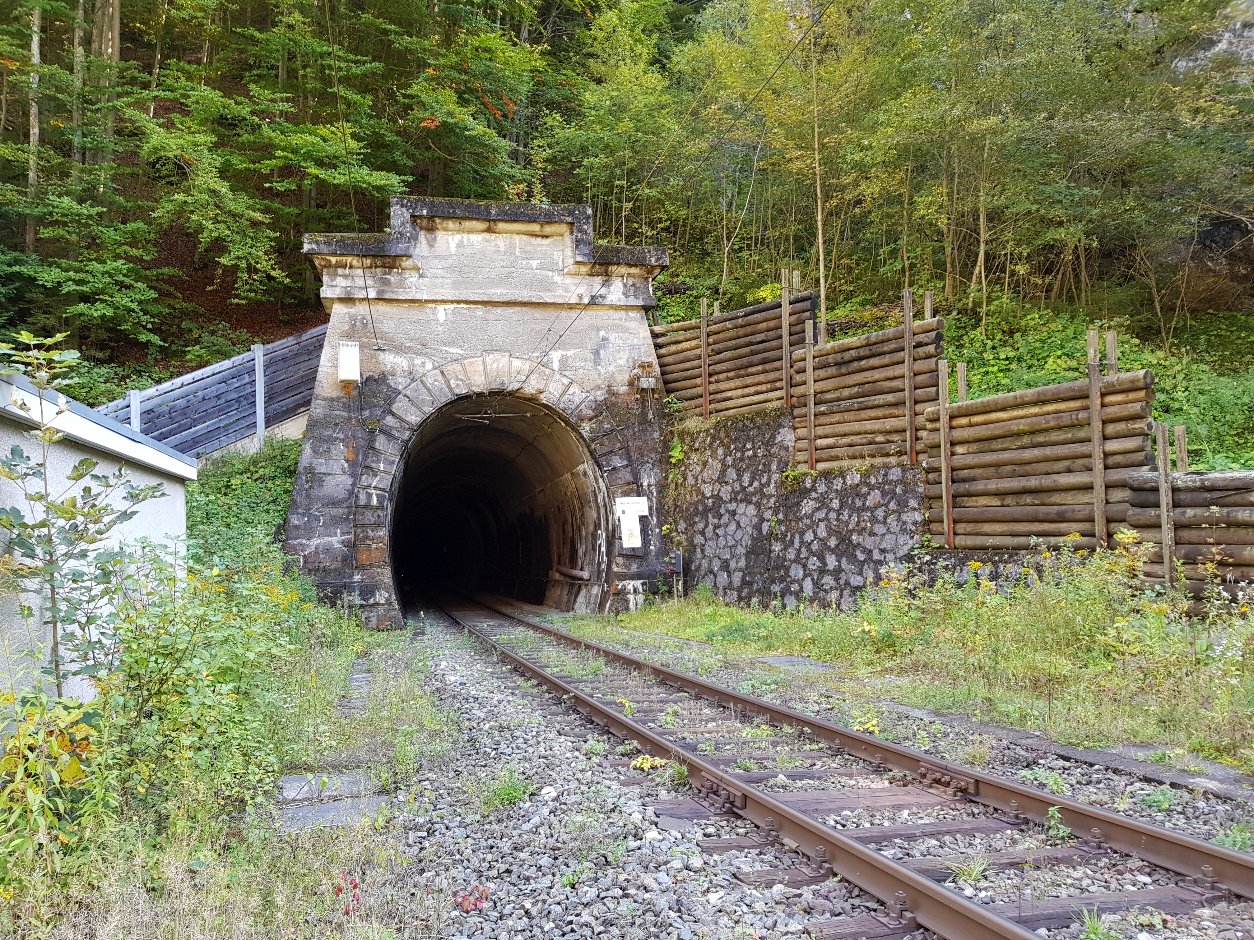 Westportal des Martinswandtunnels der Mittenwaldbahn